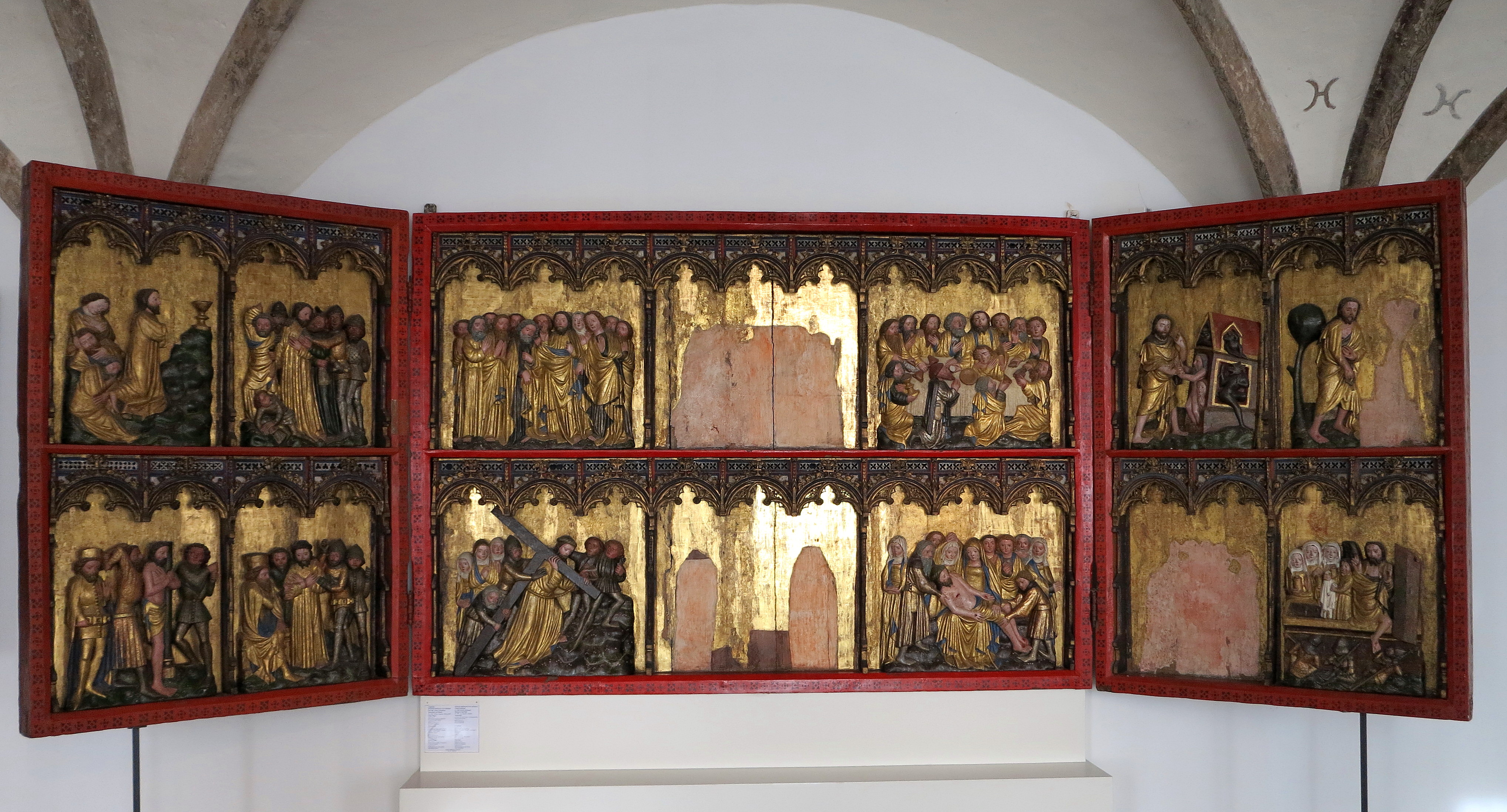 Landkirchener Retabel, Skabstavle med Fløje o. 1380. Eg, forgyldt, bemalet, Mester Bertram von Mondens virkeområde (o. 1340-1414/15, i Gottorp Slot, Slesvig, Tyskland Venstre fløj øverst (f.v.th.): Kristi beder i Gethsemanes Have, Judas forråder Kristus nederst (f.v.t.h.): Kristi hudstrygning, Kristi tornekroning I midttfeltet øverst (f.v.th.): Kristus sender sine disciple ut, Kristus som verdens dommer (Dommetag, ikke bevaret), Nadveren nederst (f.v.th.): Kristi korsegang, Kristi korsfæstelse (ikke bevaret), Begræstelse Kristi Højre fløj øverst (f.v.th.): Nedfarten til dødsriget, Kristus som havemand nederst (f.v.t.h.): Kristi gravlægelse (ikke bevaret), Kristi opstandelse